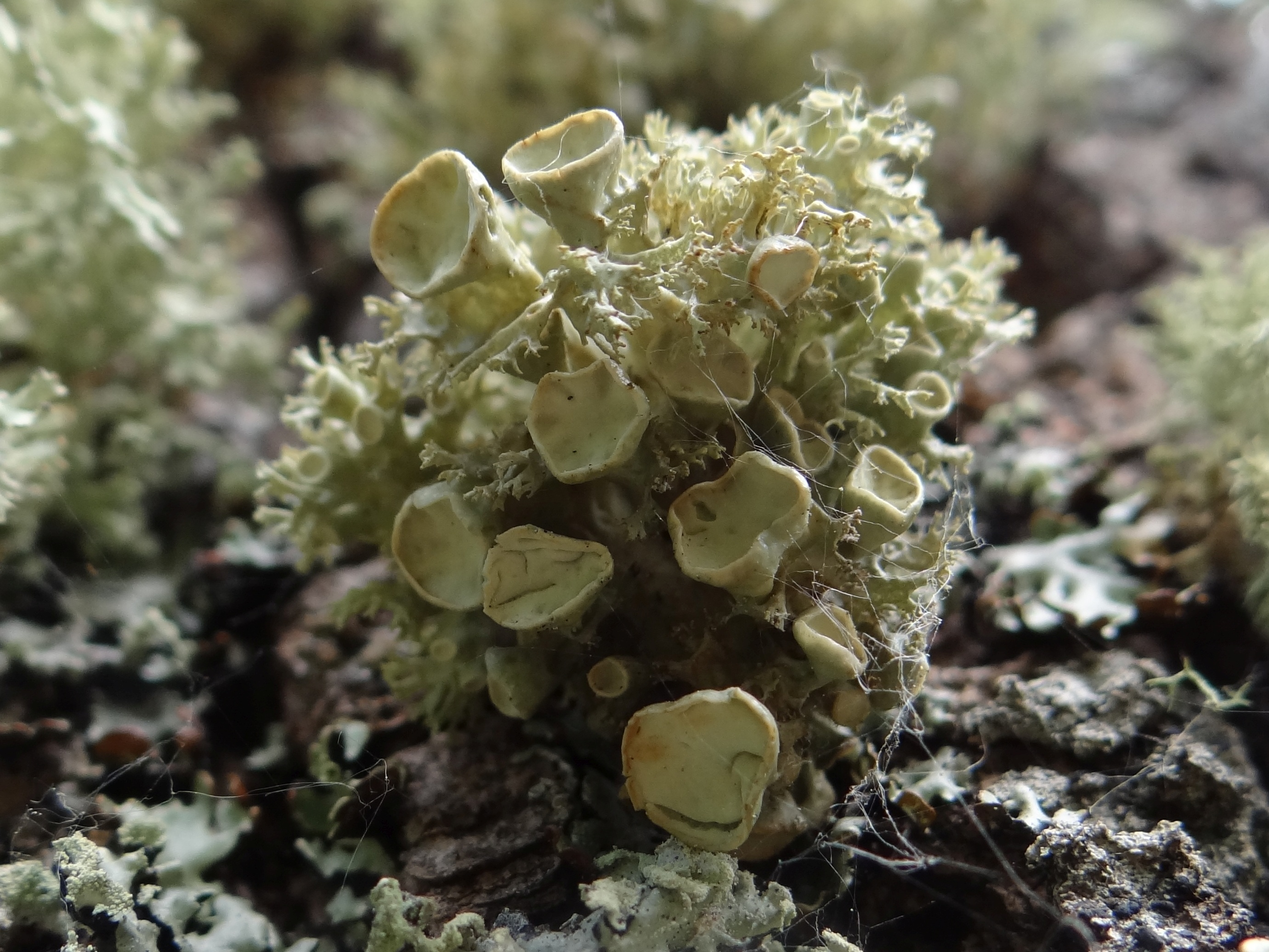 Ramalina fastigiata (location:Slovakia, Vyšné Ružbachy, park)